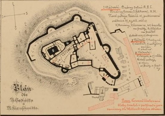 J. V. K. Boušek: hrad Rabí z východní strany, vlevo dole situační plán (barevná tuš) - pérová kresba